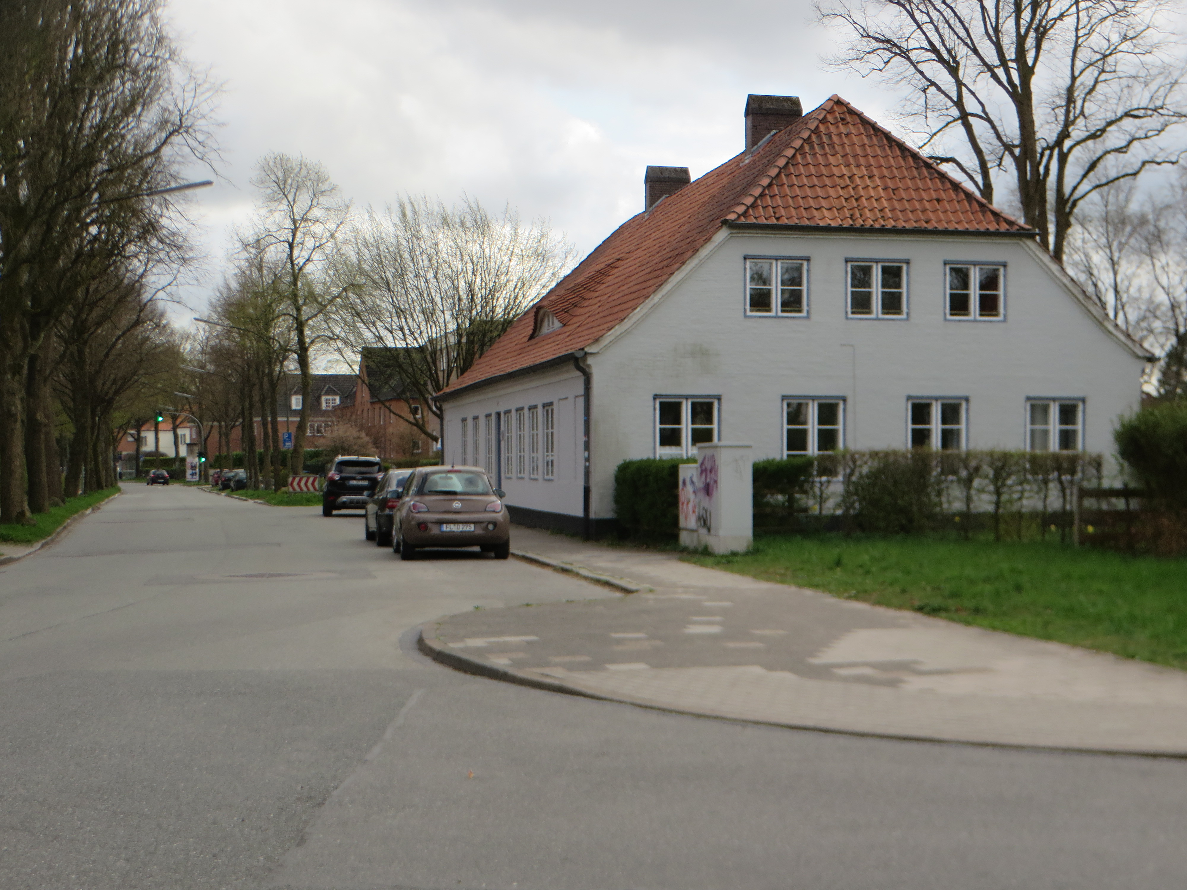 Marienhof, Nerongsallee 22 (Flensburg April 2018), Bild 01